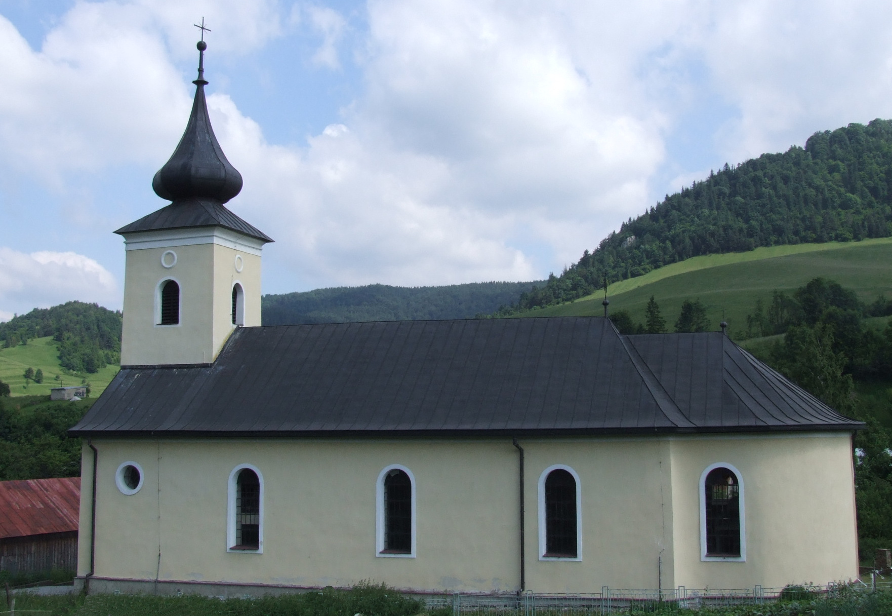 Greckokatolicky chrám Stráňany (Kościół grecko-katolicki w Stranianach)